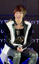 2011년 1월 6일, 삼성 딜라이트 홍보관에서 열린 Life is Tab 쇼케이스 행사에 참석한 강승윤